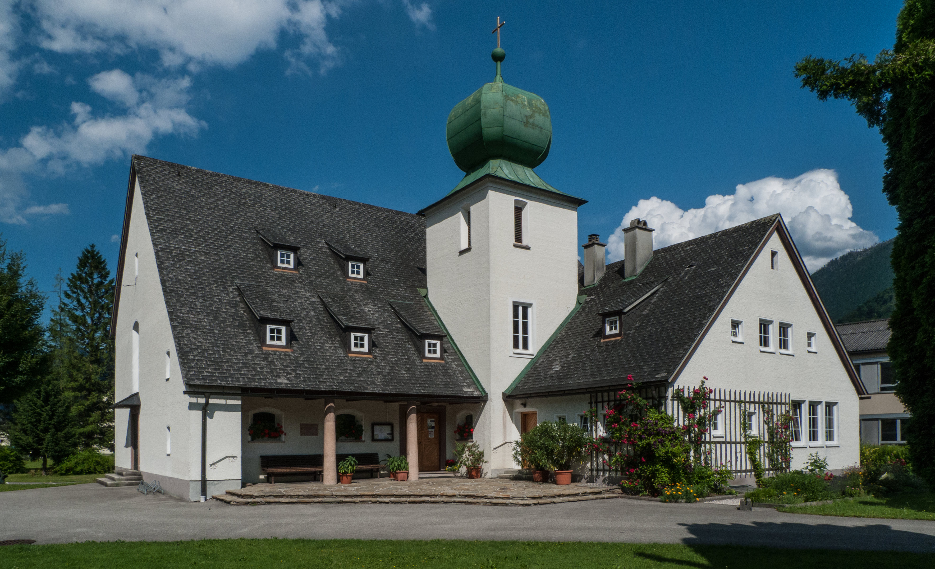 Evang. Pfarrkirche A.B., Gnadenkirche